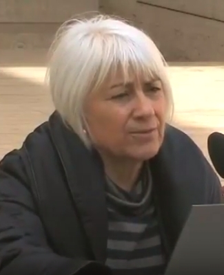 Carmen Herrero. Los Viernes al Sol.